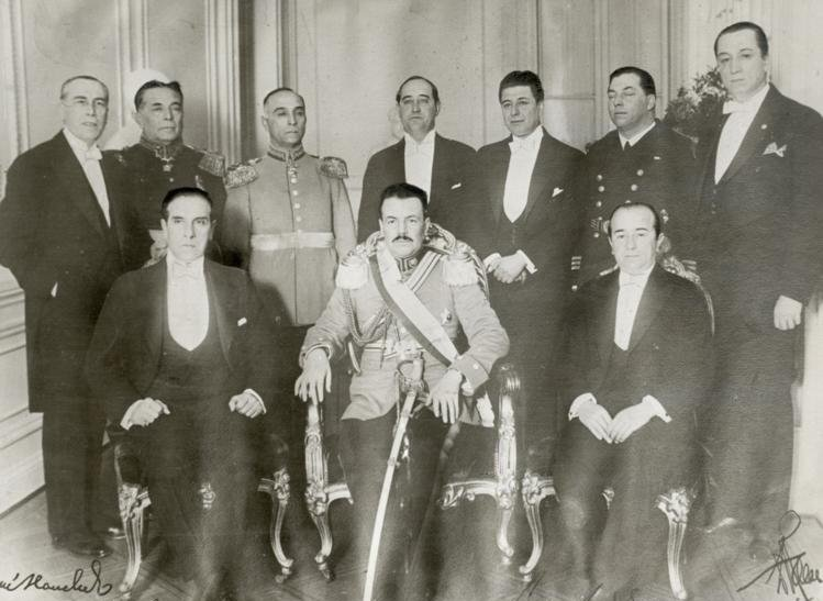 Fotografía de Carlos Ibáñez del Campo, Presidente de Chile (1927-1931; 1952-1958), junto a sus Ministros de Estado hacia el año 1927.